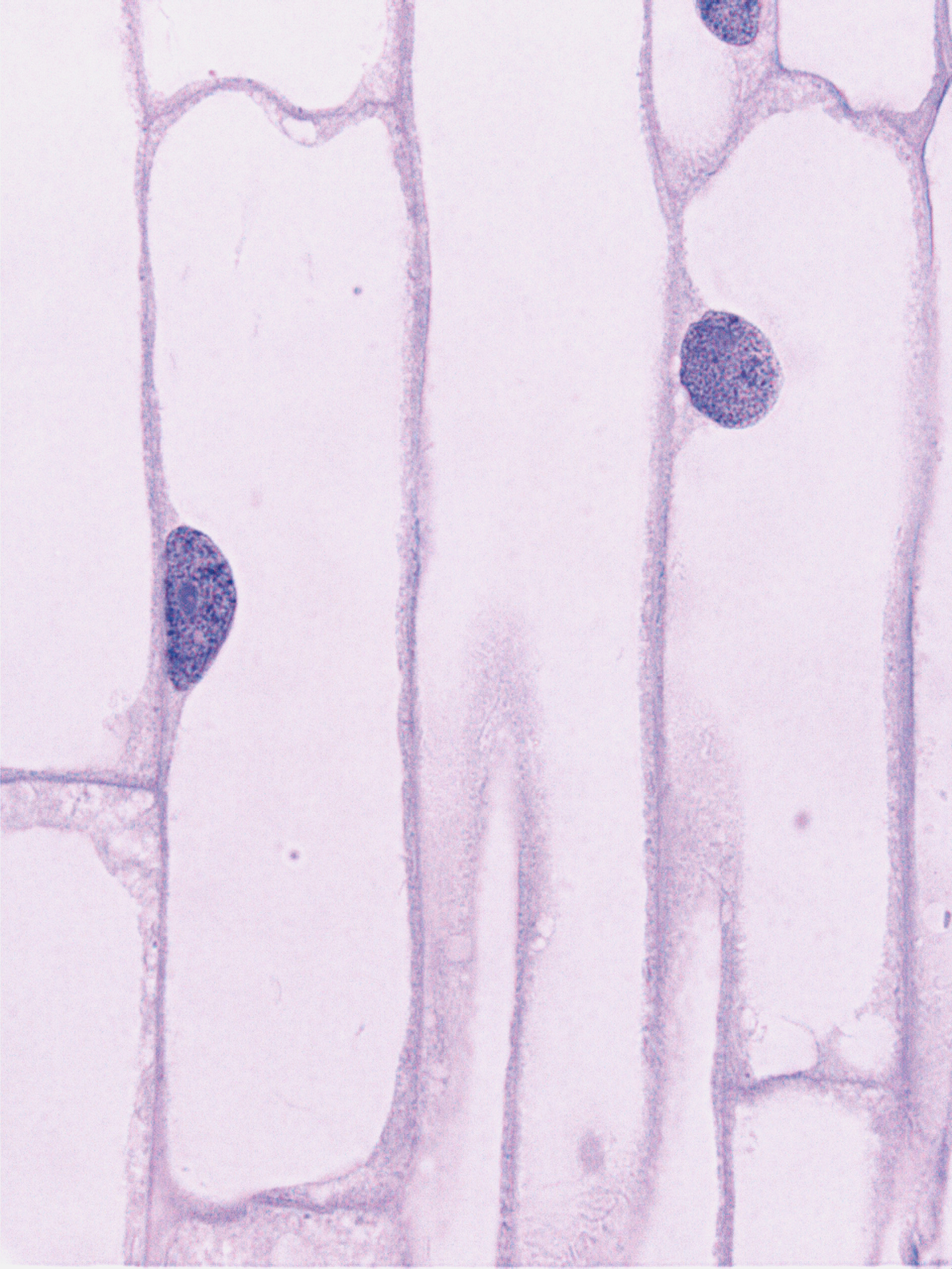 Längsschnitt durch die Wurzelspitze der Küchenzwiebel (Allium cepa). Zellen aus dem Bereich der Streckungszone. Zur Bezeichnung einzelner Elemente den Mauszeiger über das Bild bewegen (Notizfunktion).